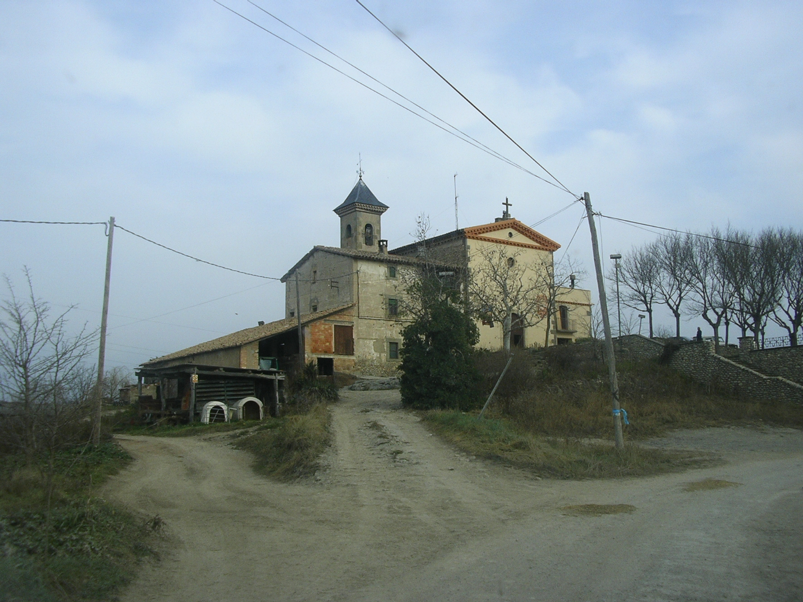 Ermita de Sant Jaume de Vilamontà (Manlleu, Osona).